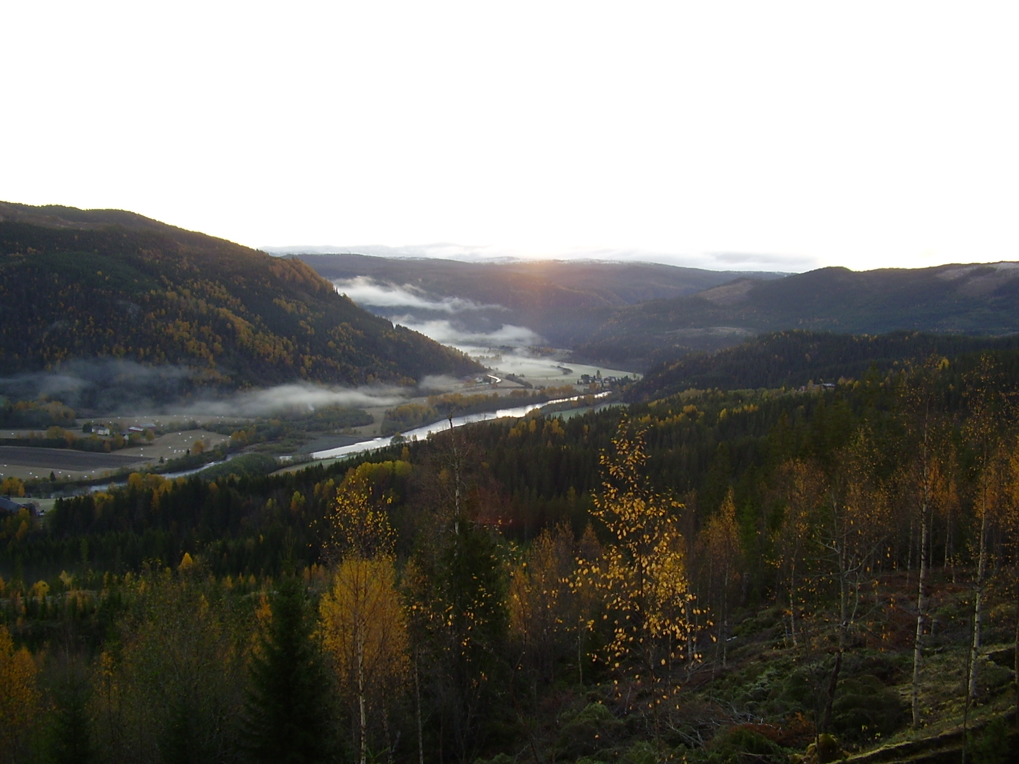 Stjørdalen mellom Hegra og Meråker.